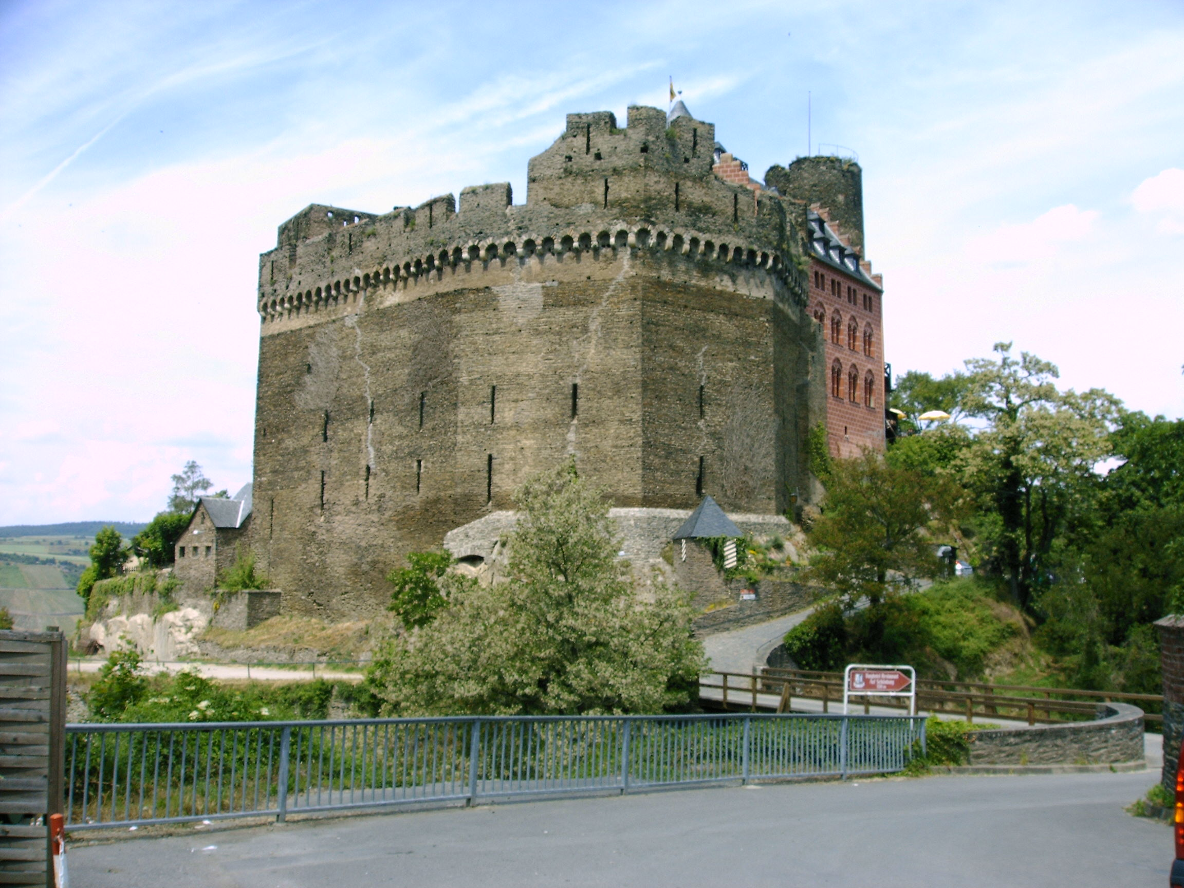 Burg Schönburg - Hoher Mantel